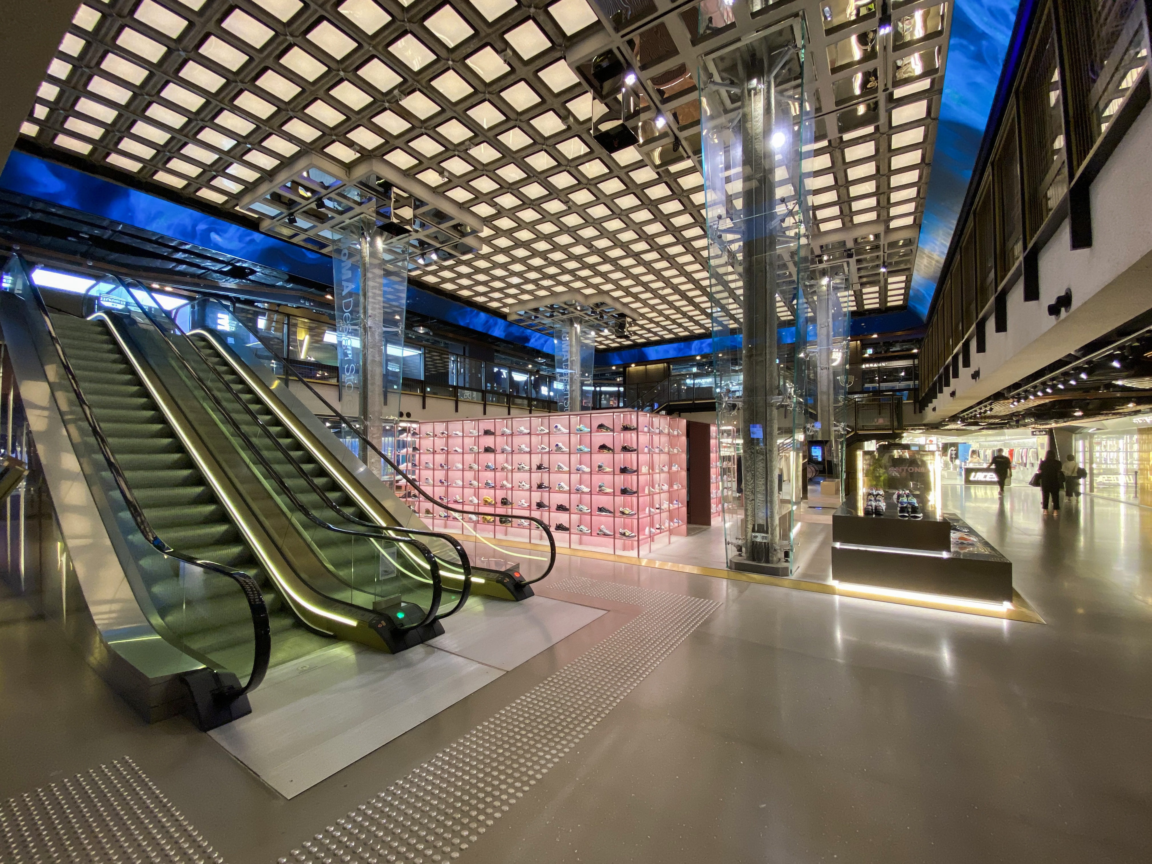 K11 MUSEA MUSE EDITION Atrium